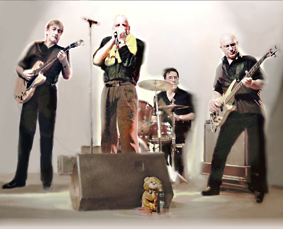 pressefoto